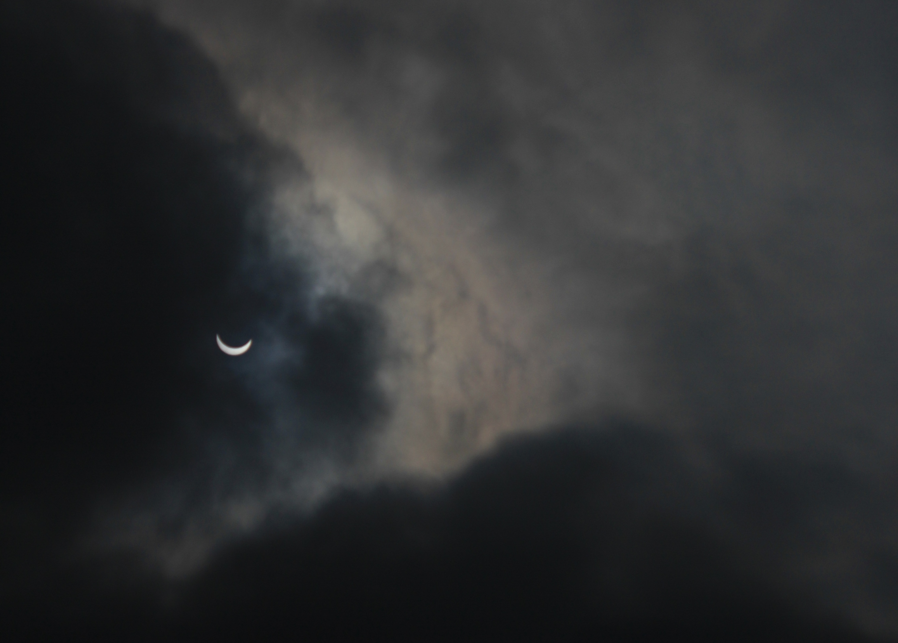 éclipse du 20 mars 2015 à Lorient, France, 10H19